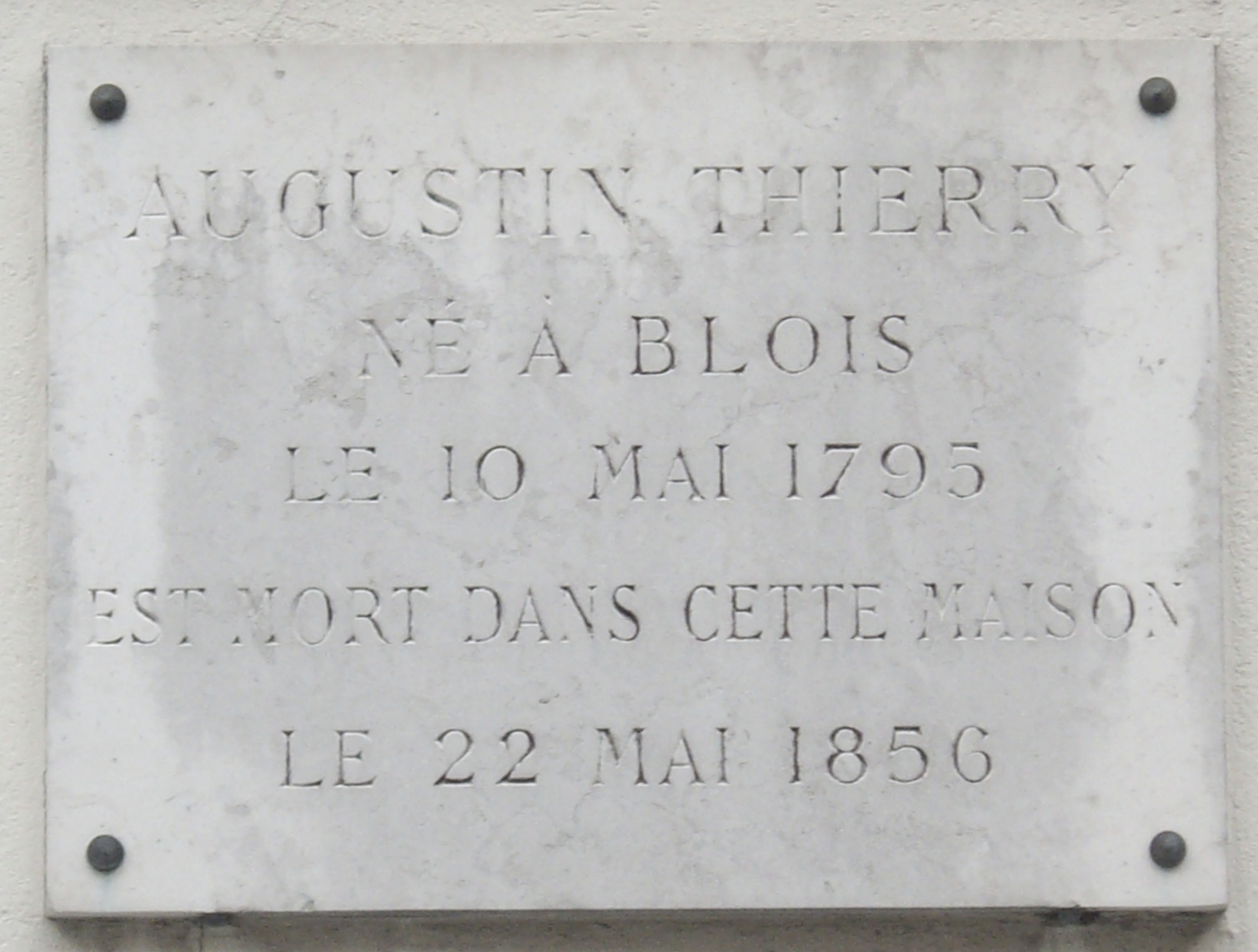 Plaque apposée au n° 32 de le rue du Montparnasse, Paris 6e, où mourut l'historien Augustin Thierry (1795-1856) le 22 mai 1856.